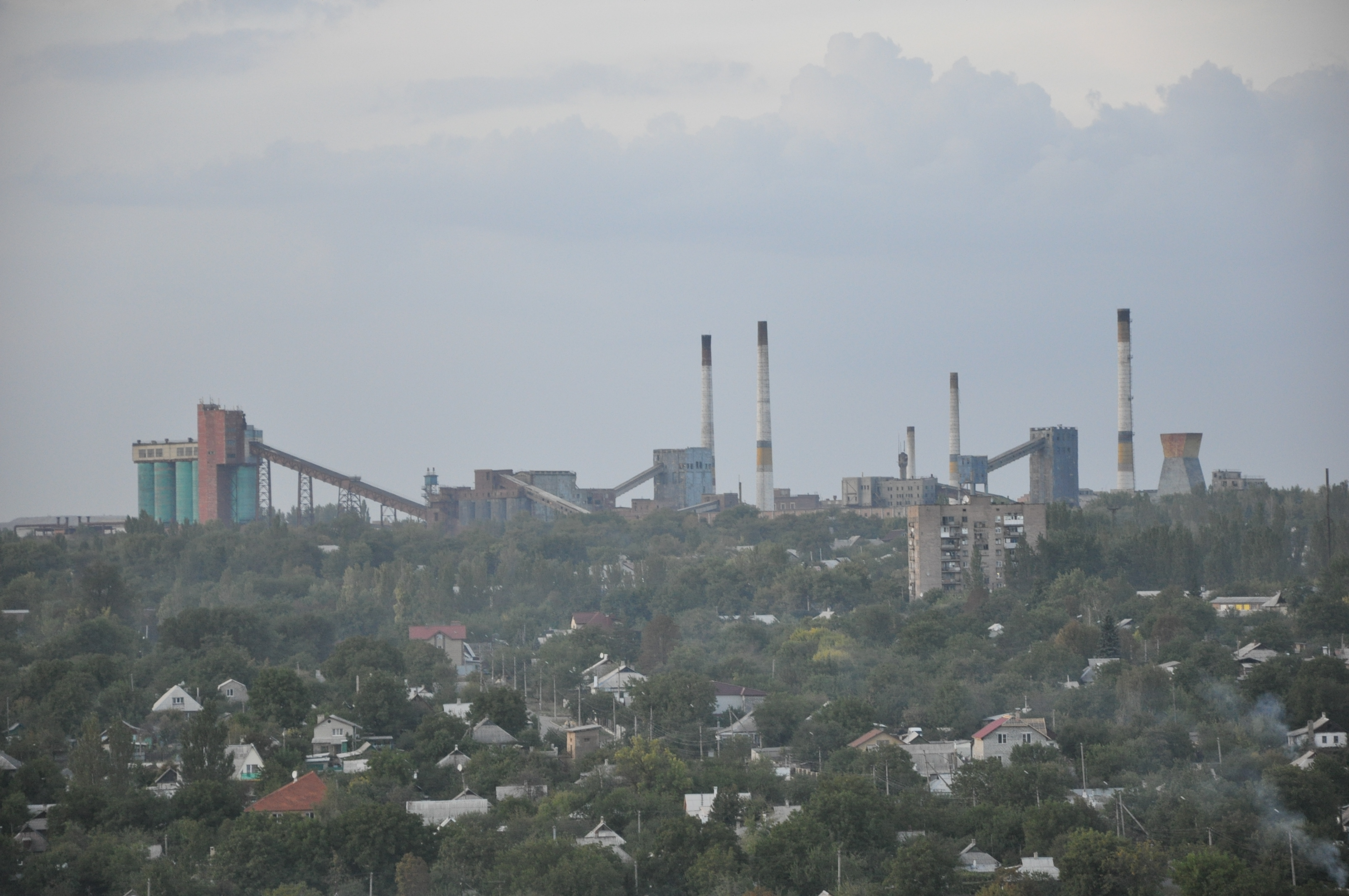 Донецкий коксохимический завод.